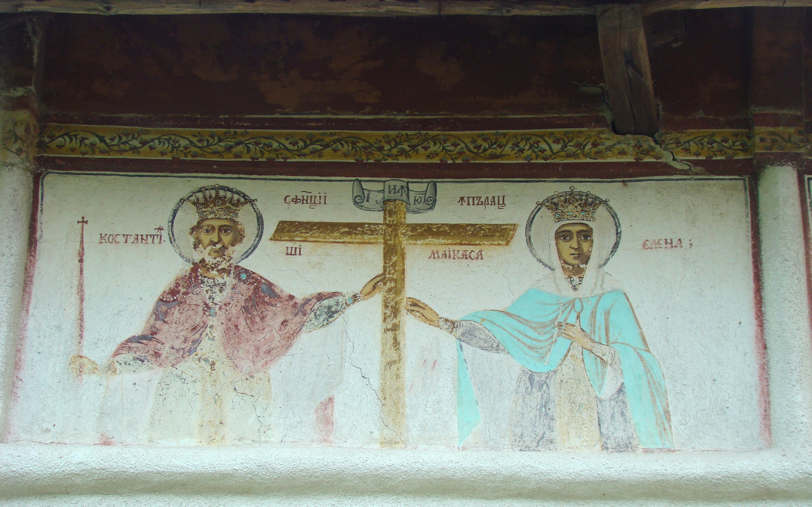 Biserica „Sf. Nicolae”, „Sf. Dumitru” și „Sf. Împărați”, sat Prigoria; comuna Prigoria